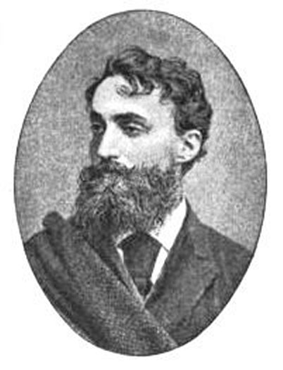 Emile Mario Vacano (1840-1892). In: Gute Kameraden. Von Peter Rosegger. Wien, Pest, Leipzig, 1893. S. 154